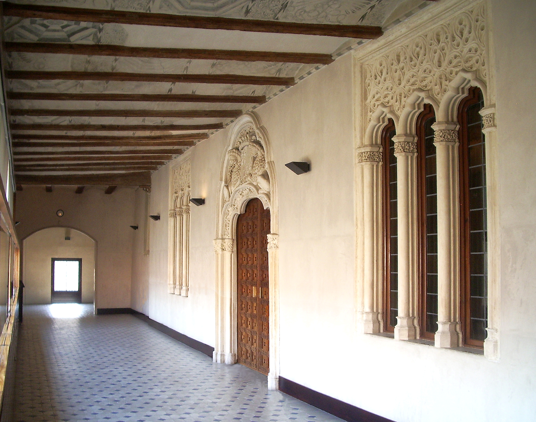 Corredor de acceso a las salas nobles del Palacio de los Reyes Católicos del Palacio de la Aljafería (Zaragoza, España). A la derecha, en el centro, portada de ingreso al Salón del Trono.